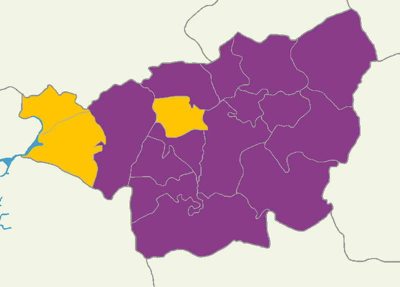 Diyarbakır'da 2014 Türkiye cumhurbaşkanlığı seçimi